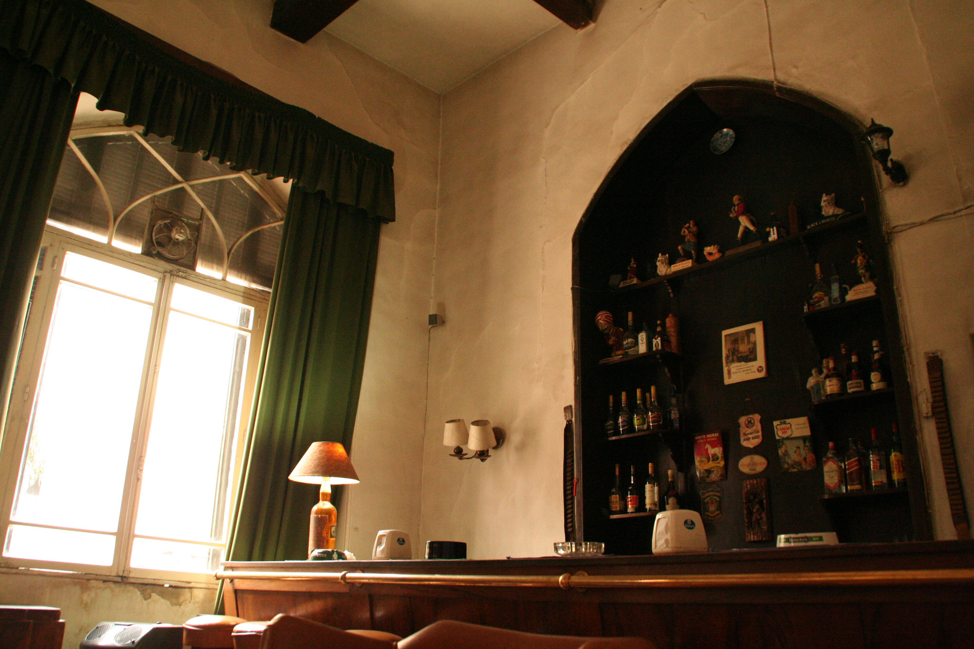 Interior de la cafetería del Hotel Baron, en Aleppo, Siria. Primer hotel de lujo de la ciudad, ahora un hotel clásico que recuerda la época colonial francesa. Famoso por sus visitas ilustres, como la de Thomas Edward Lawrence (Lawrence de Arabia).